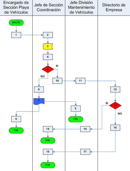 Ejemplo de Flujograma o Diagrama de flujo aplicado a procesos de reparación de vehículos.